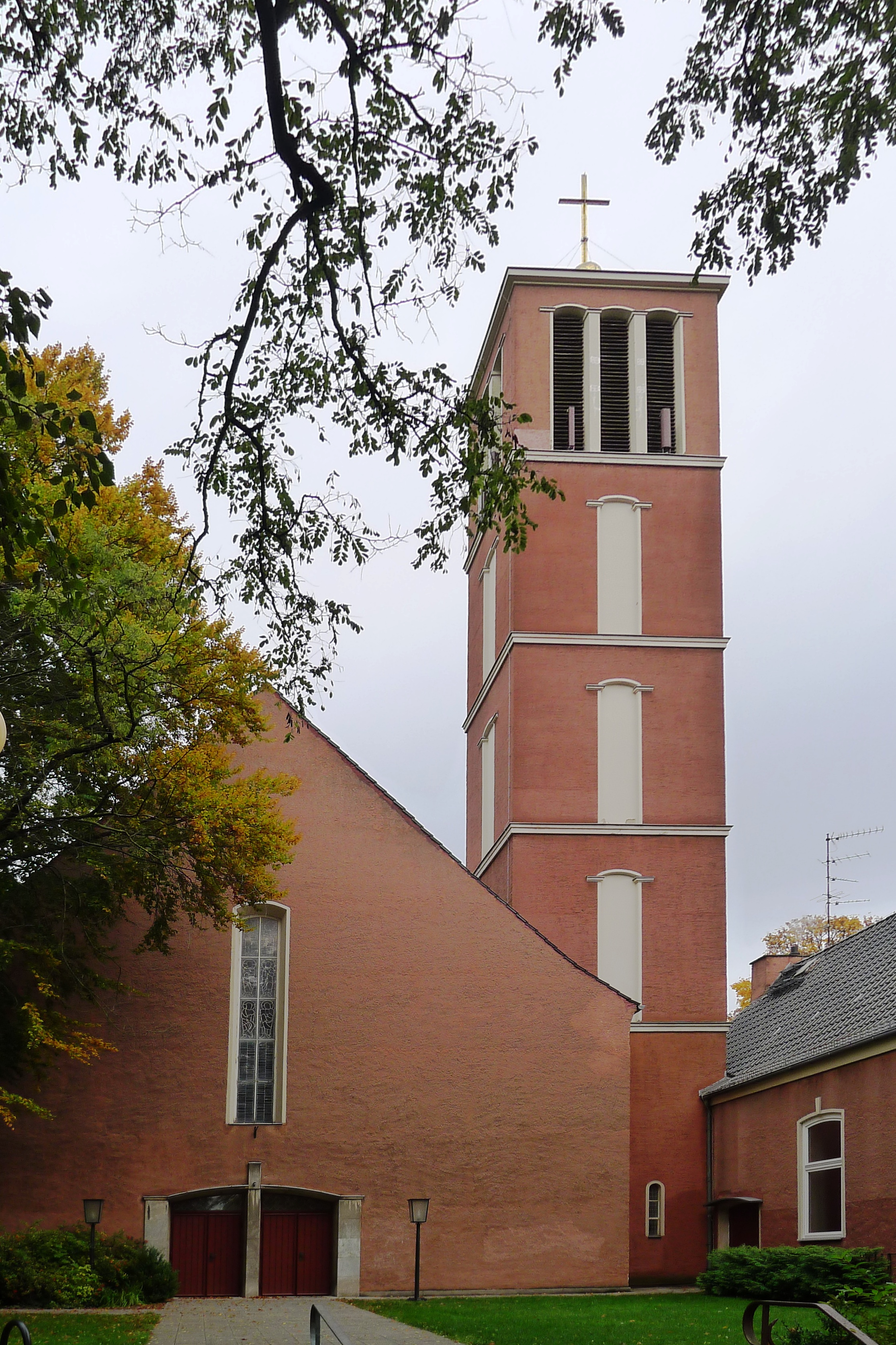 Zwischen Kirchenschiff links und Gemeindehaus rechts steht der Glockenturm.